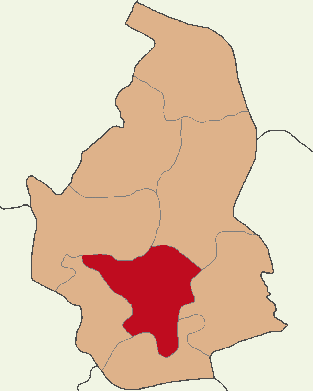 Nevşehir Merkez ilçesinin konumu